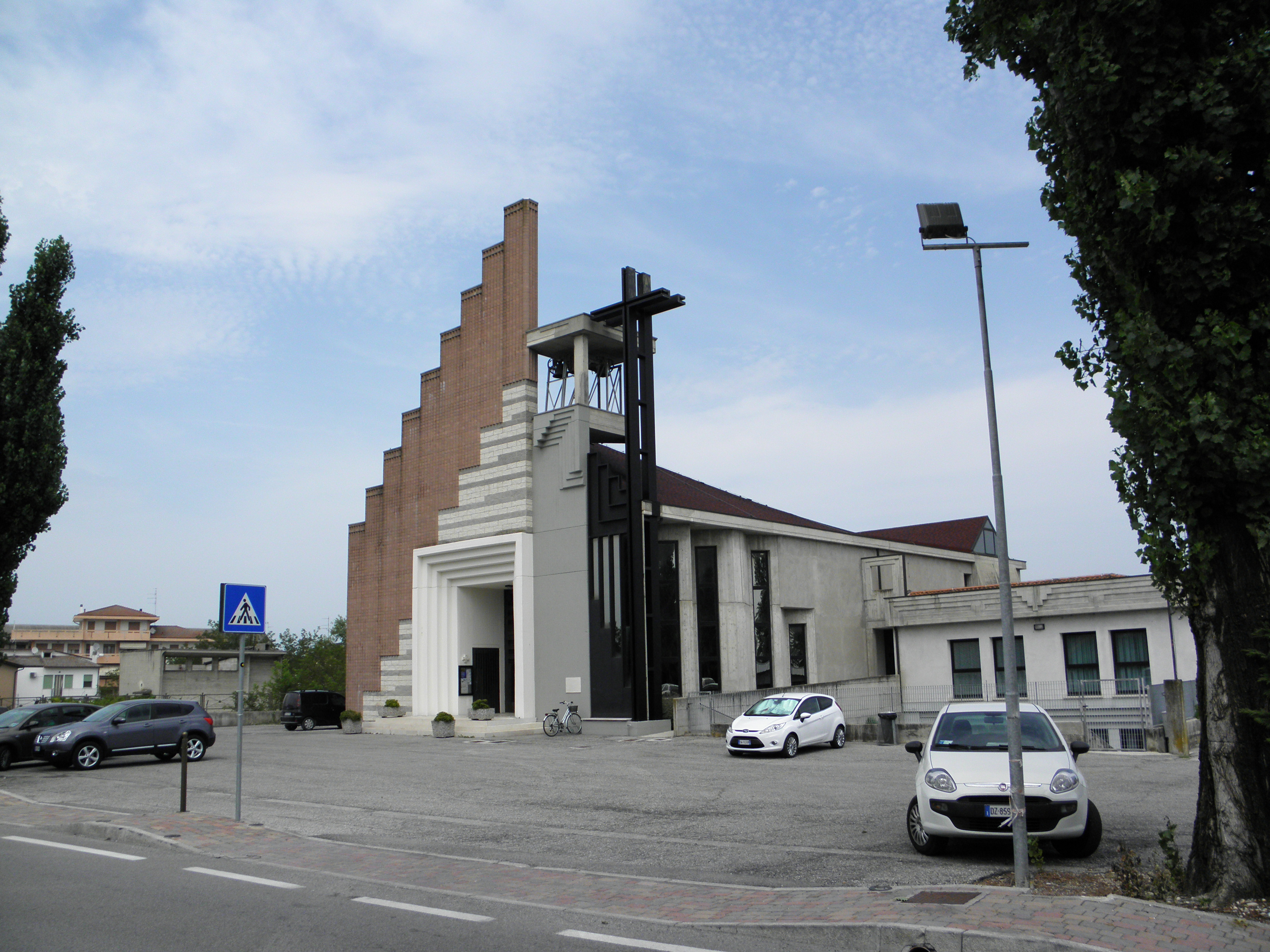 Brondolo, frazione di Chioggia: la chiesa parrocchiale di San Michele Arcangelo.